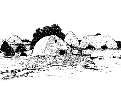 Les Savournins Bas, alias le "Village des Bories" à Gordes (Vaucluse). Vue du site muséologique depuis le sud. Dessin de Michel Rouvière.